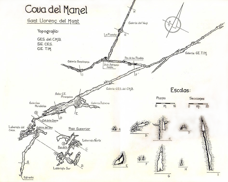 Plano topográfico de la Cova del Manel, Matadepera, Barcelona (España)